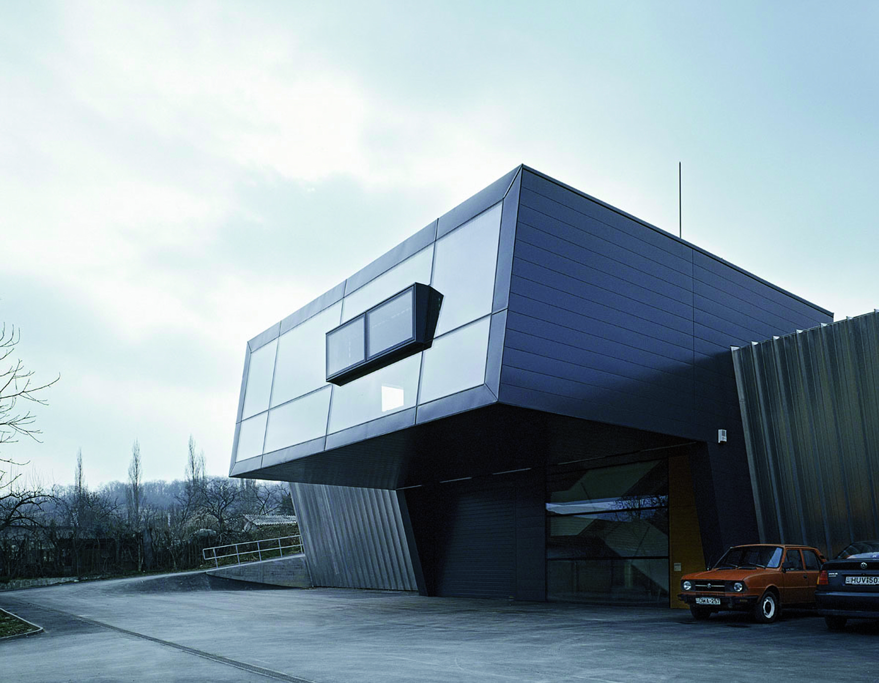 Weingut Franz Weninger in Balf bei Sopron, Aussenansicht